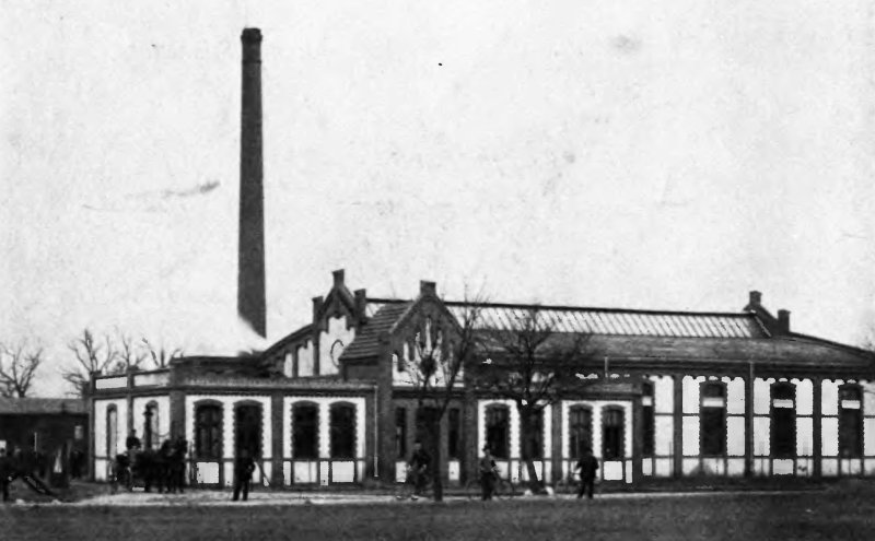 Fabryka maszyn Bydgoskiego Towarzystwa Żeglugi Holownicznej na Kapuściskach Małych